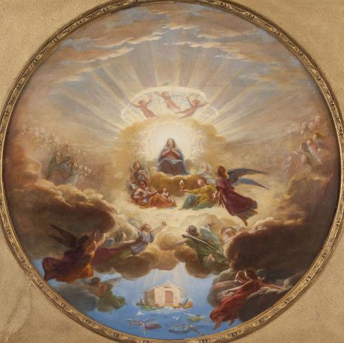 Pierre Claude François Delorme - Tondo de la Translation de la sainte Maison de Lorette